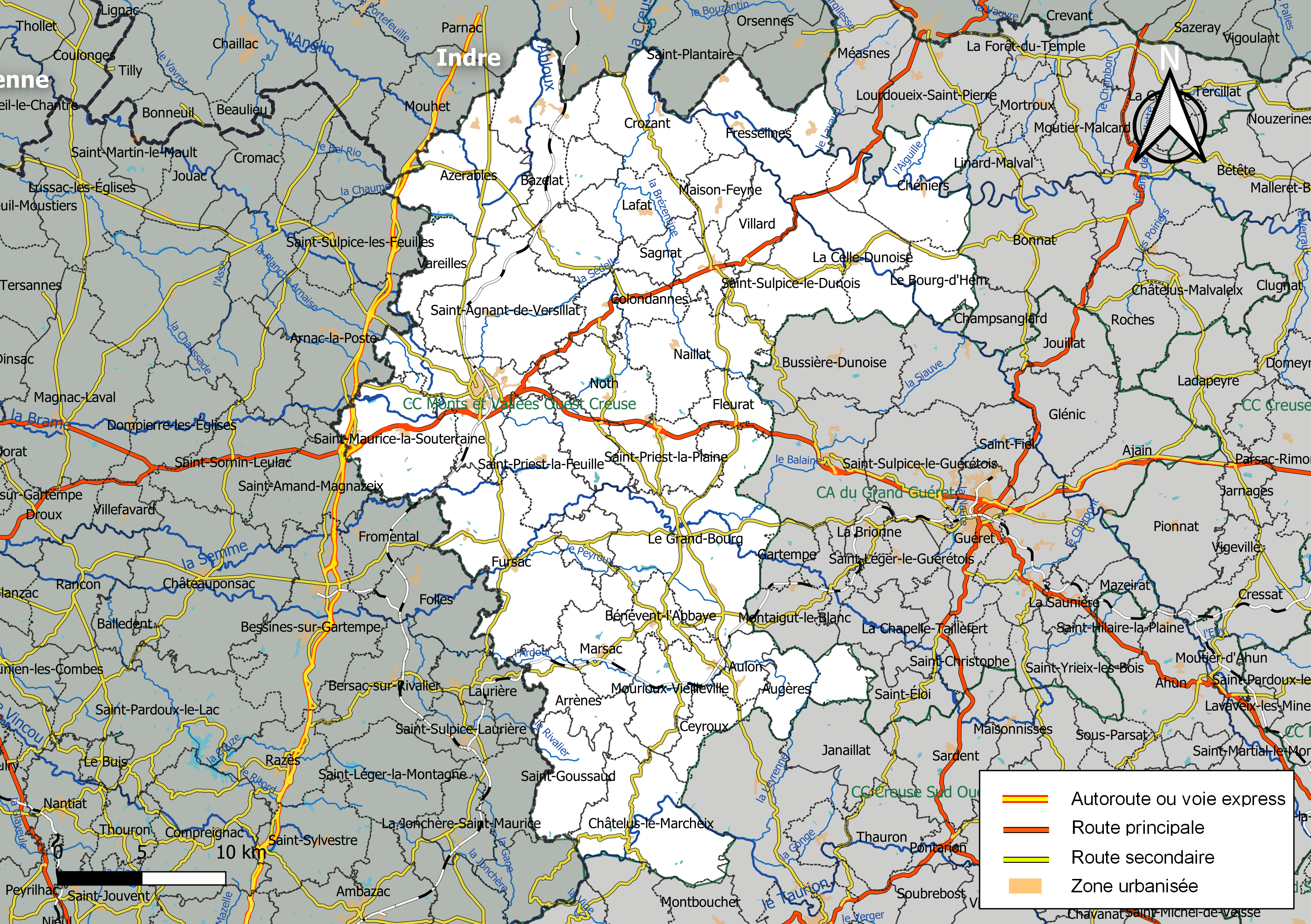 Carte géographique de l'intercommunalité Monts et Vallées Ouest Creuse, département de la Creuse, France. Composition au 1er janvier 2019.